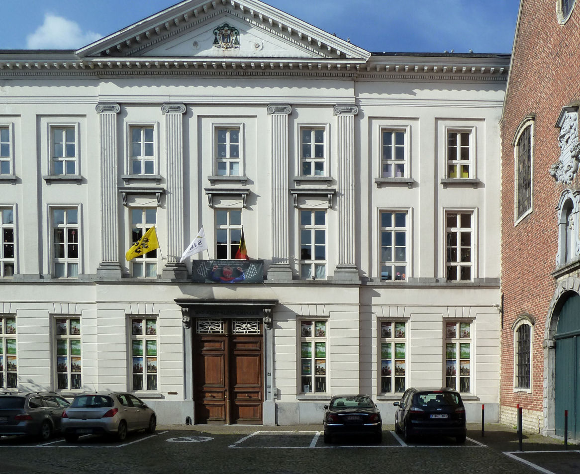 Sint-Jozef-Klein-Seminarie (Saint Joseph Minor Seminary) in Sint-Niklaas. Sint-Niklaas, East Flanders, Belgium